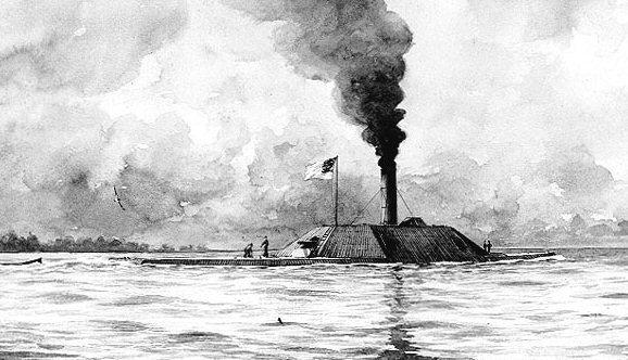 CSS Albemarle (1864-1864) CSS Albemarle, okręt pancerny (taranowiec) Skonfederowanych Stanów Ameryki